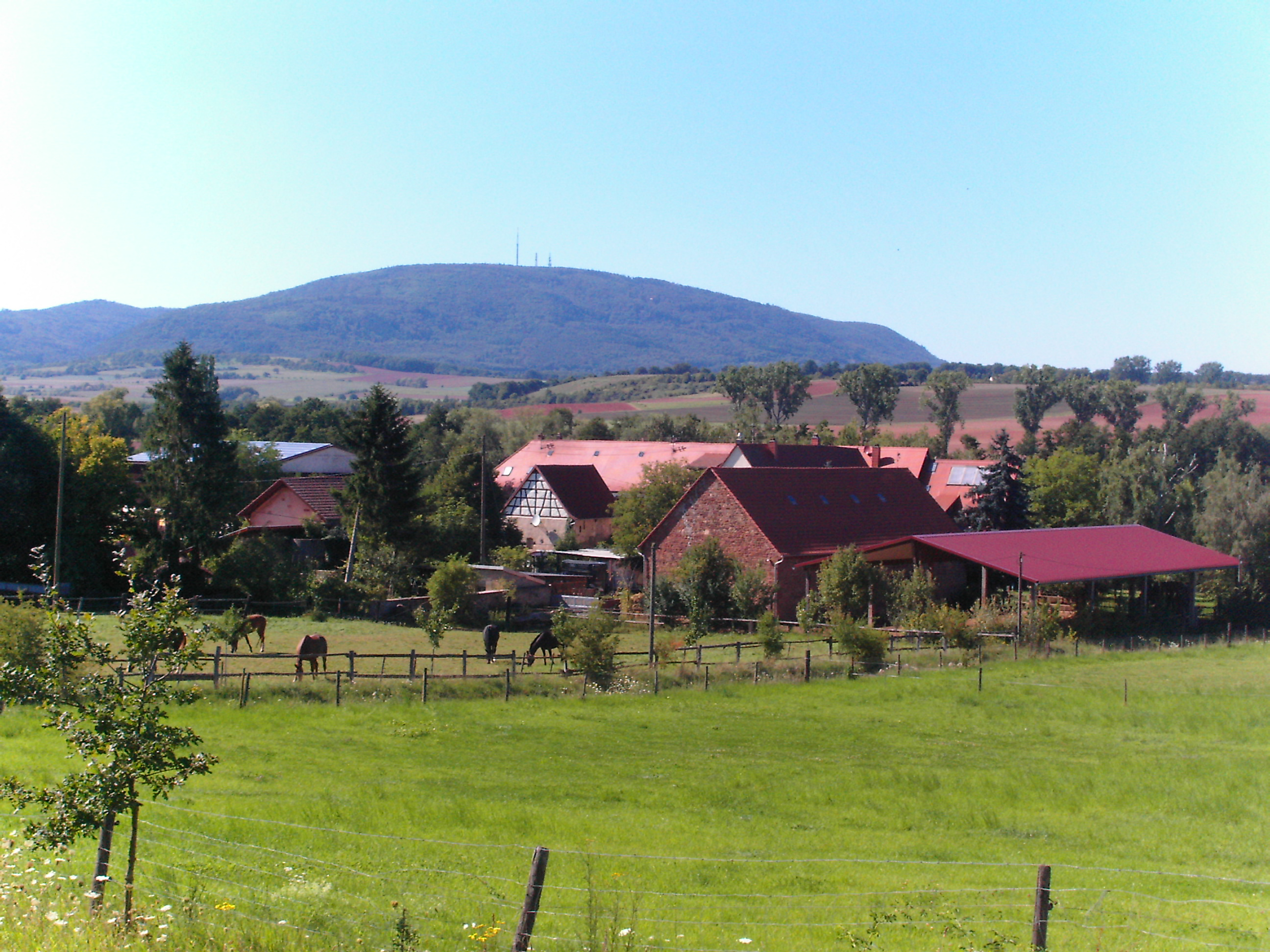 Der Münsterhof bei Dreisen (ehem. Kloster Münsterdreisen)